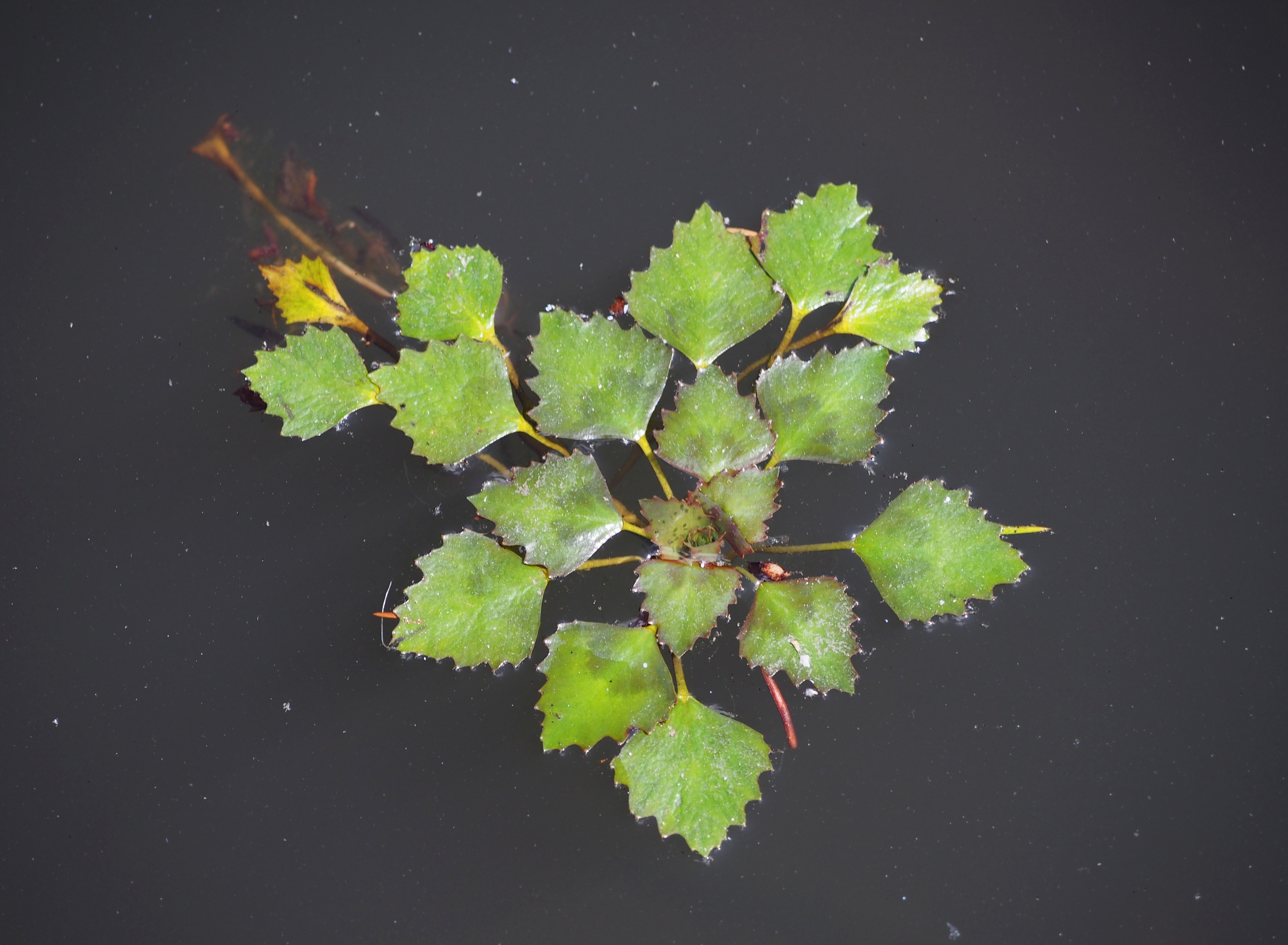 Kotewka orzech wodny (Trapa natans), okaz uprawiany. Ogród botaniczny UWr, Wrocław, Polska.